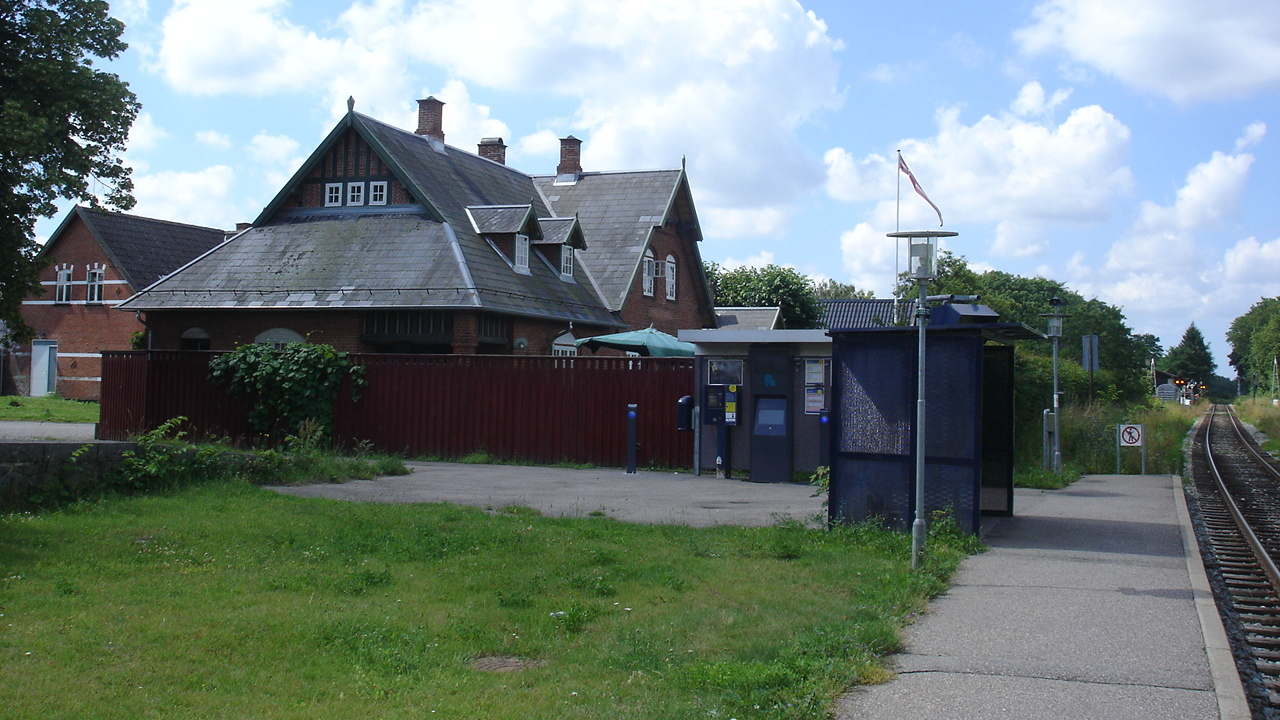 Vedde station, sporside